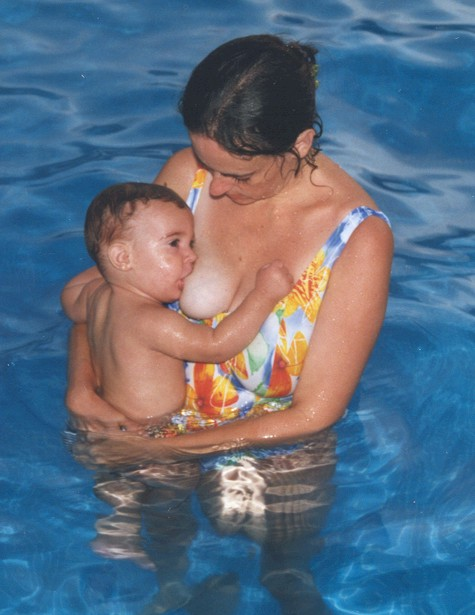 Lactancia materna